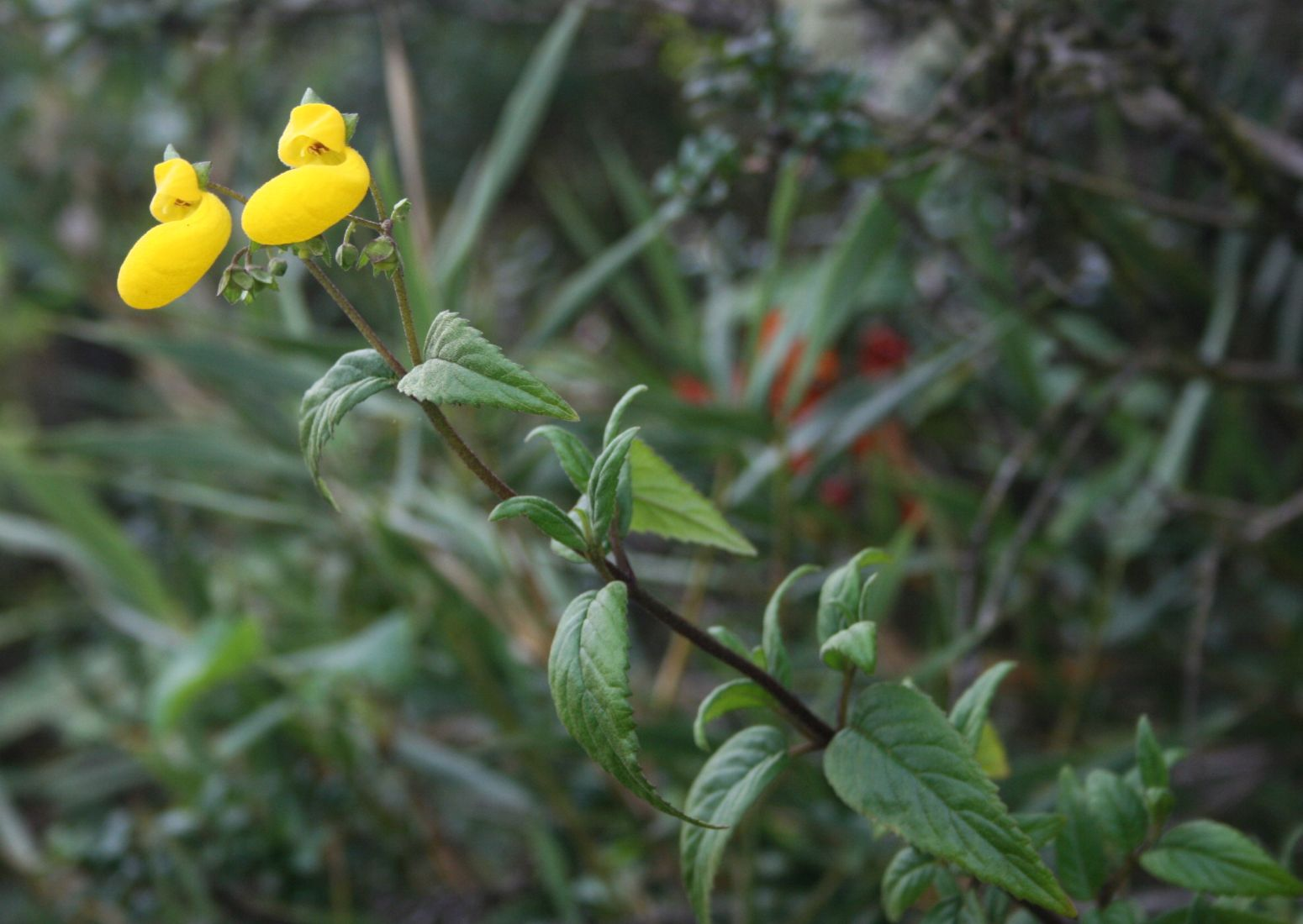 Calceolaria irazuensis, Pantoffelblumengewächse (Calceolariaceae) - Costa Rica: Prov. Cartago, Cordillera de Talamanca, Carretera Interamericana N Cerro de la Muerte, ca. km 86, ca. 3150 m